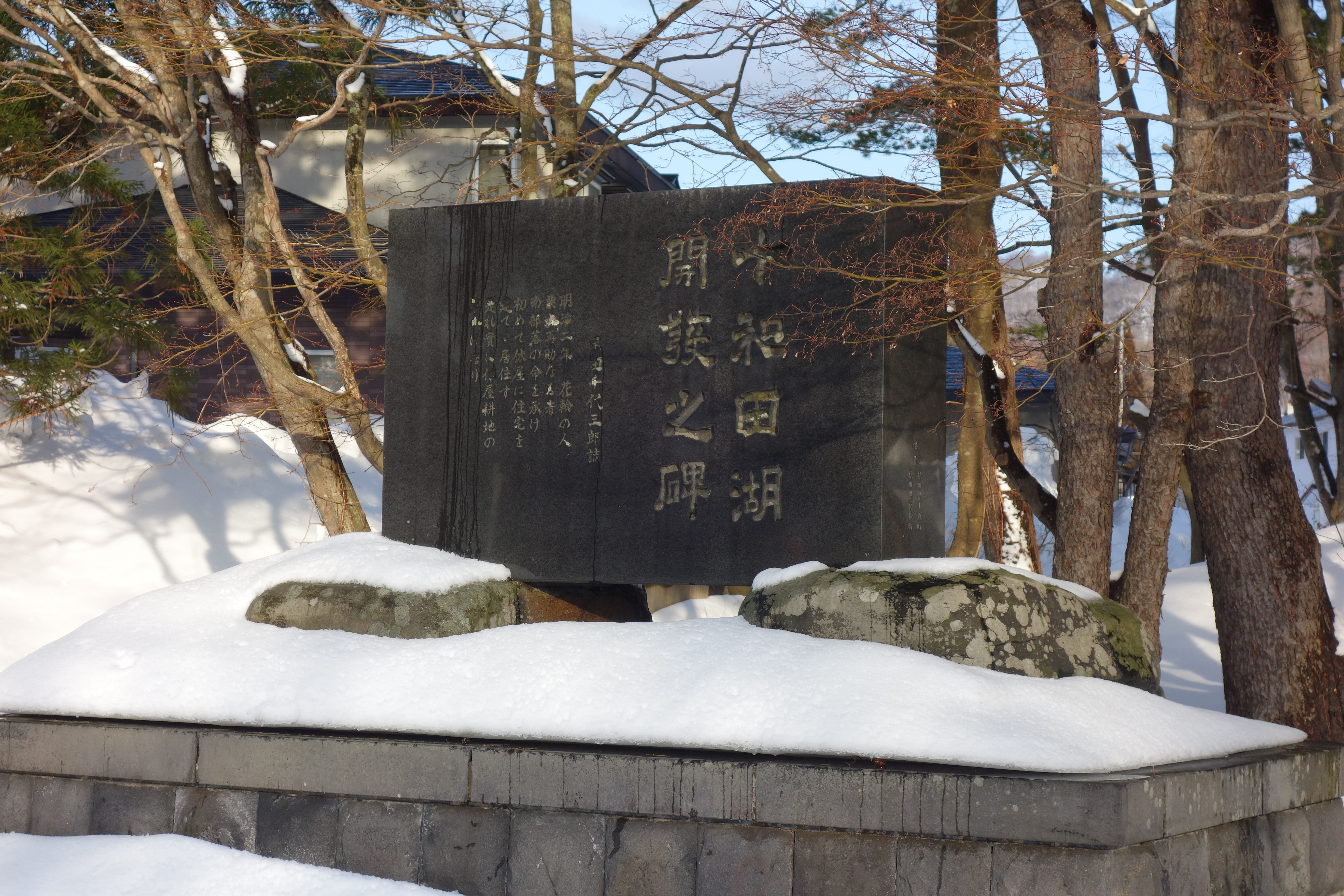 十和田湖畔の休屋（秋田県側）にある、栗山新兵衛の記念碑